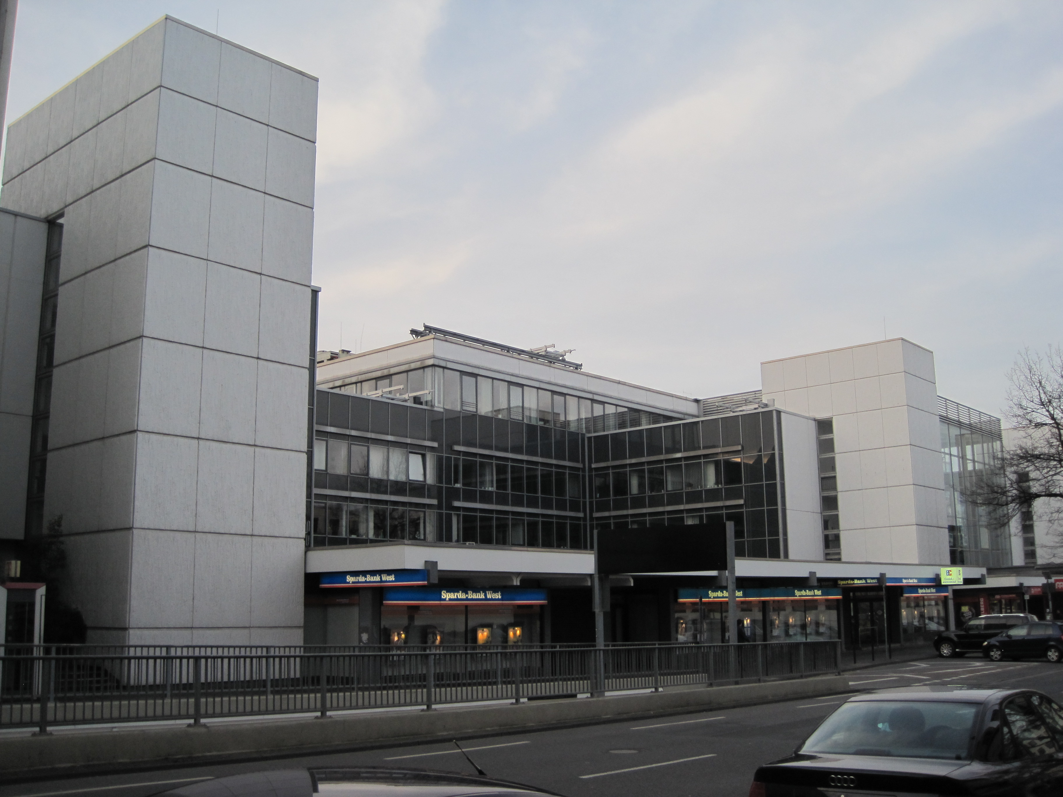 Das Foto zeigt das Technische Rathaus Hamm mit Blick von der linken Seite.